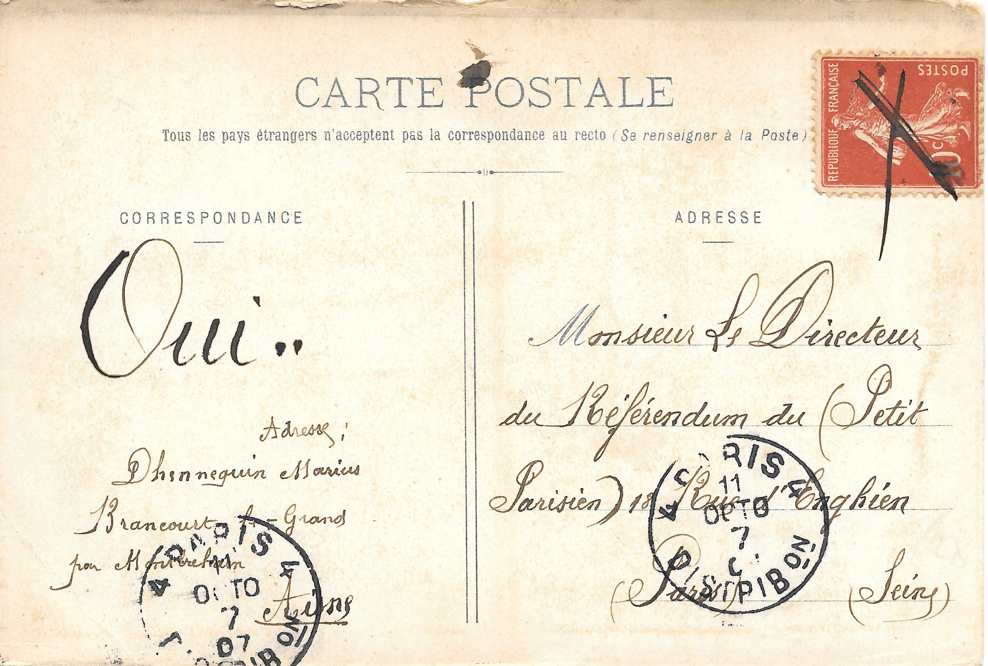 Oblitération manuelle datée de 1907